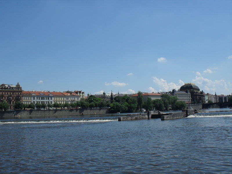 Praga, fragment staromiejskiego jazu na Wełtawie